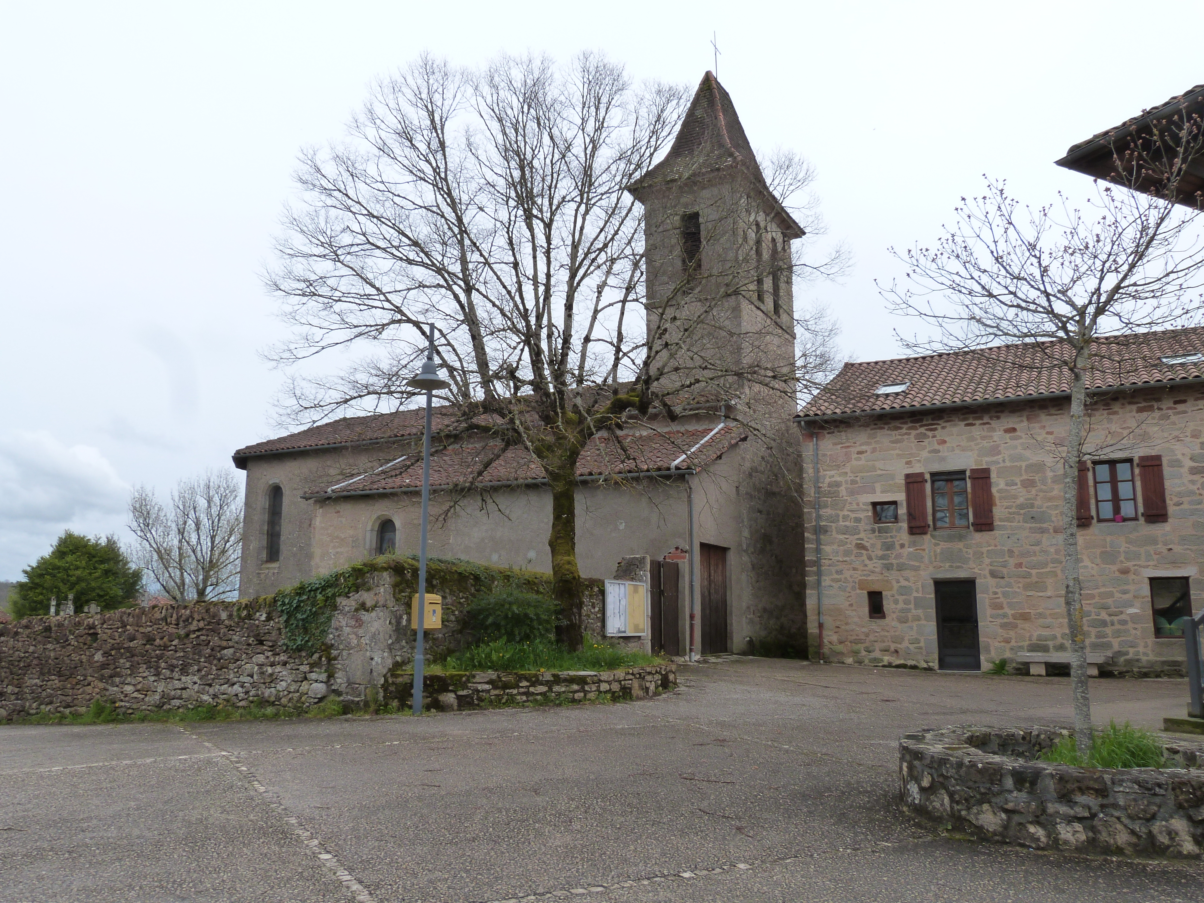 L'église Saint-Pierre vue depuis la place de la mairie (Planioles, Lot)